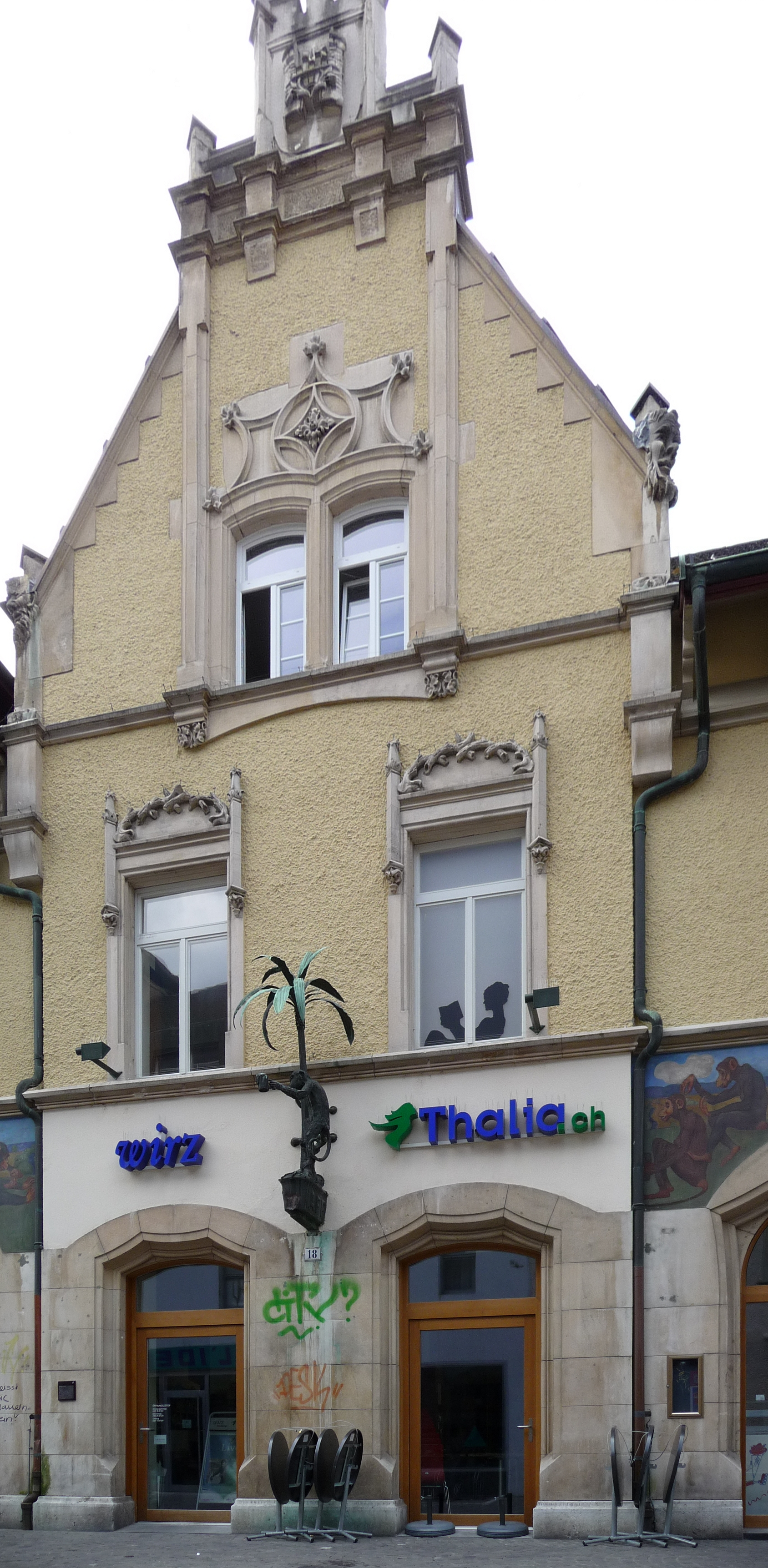 Aff in Aarau